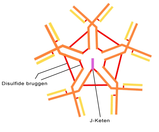 Basic Structure IgM